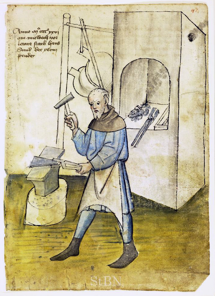 hans (Hans) Smid (Schmied) , Smid (Schmied) Transkription und weitere Informationen